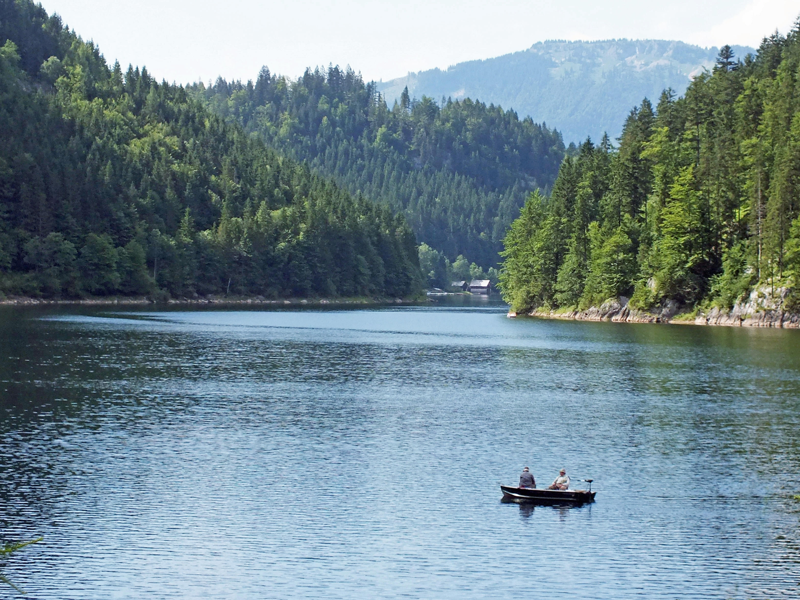 Am Nordteil des Salza-Stausees (Steiermark)